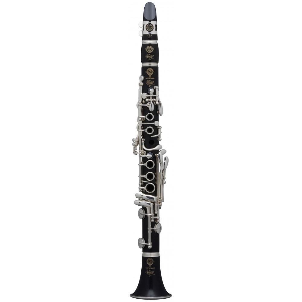 (Clarinet Eb)